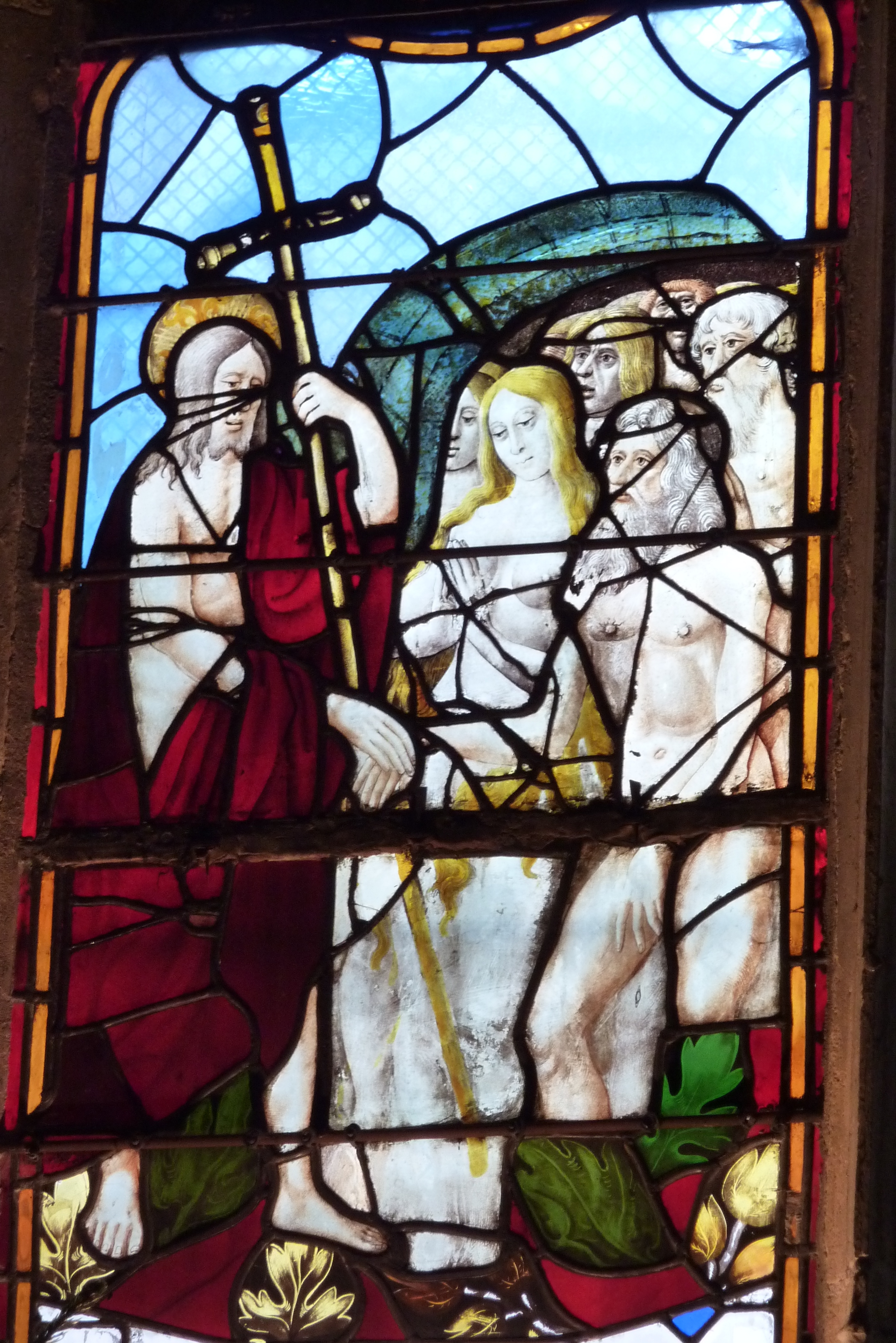 Teil eines Bleiglasfensters (Langhaus) in der katholischen Pfarrkirche St-Médard in Paris, Darstellung: Höllenfahrt Christi (16. Jahrhundert)